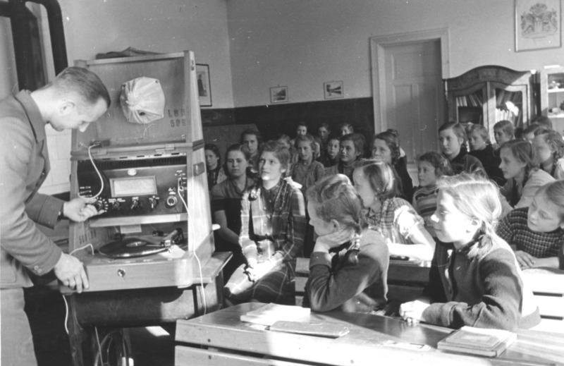 Schulfunk in der Schulklasse - Eine Stunde, auf die sich alle freuen. 80 Hamburger Schulen wurde mit je einem Spezialgerät für den Empfang der Schulfunksendungen ausgerüstet. Der Empfänger mit Schallplattenwiedergabe, Magentophonanschluß und Verstärkeranlagen für Mikrophonbesprechung wurde von der Landesbildstelle in Zusammenarbeit mit der Schulbehörde und dem NDR entwickelt. Unser Bild zeigt eine Mädchenklasse in Hamburg-Bergstedt, als eine der ersten ein Gerät erhielt. 6-3-49 Illus-dpd 3015-49